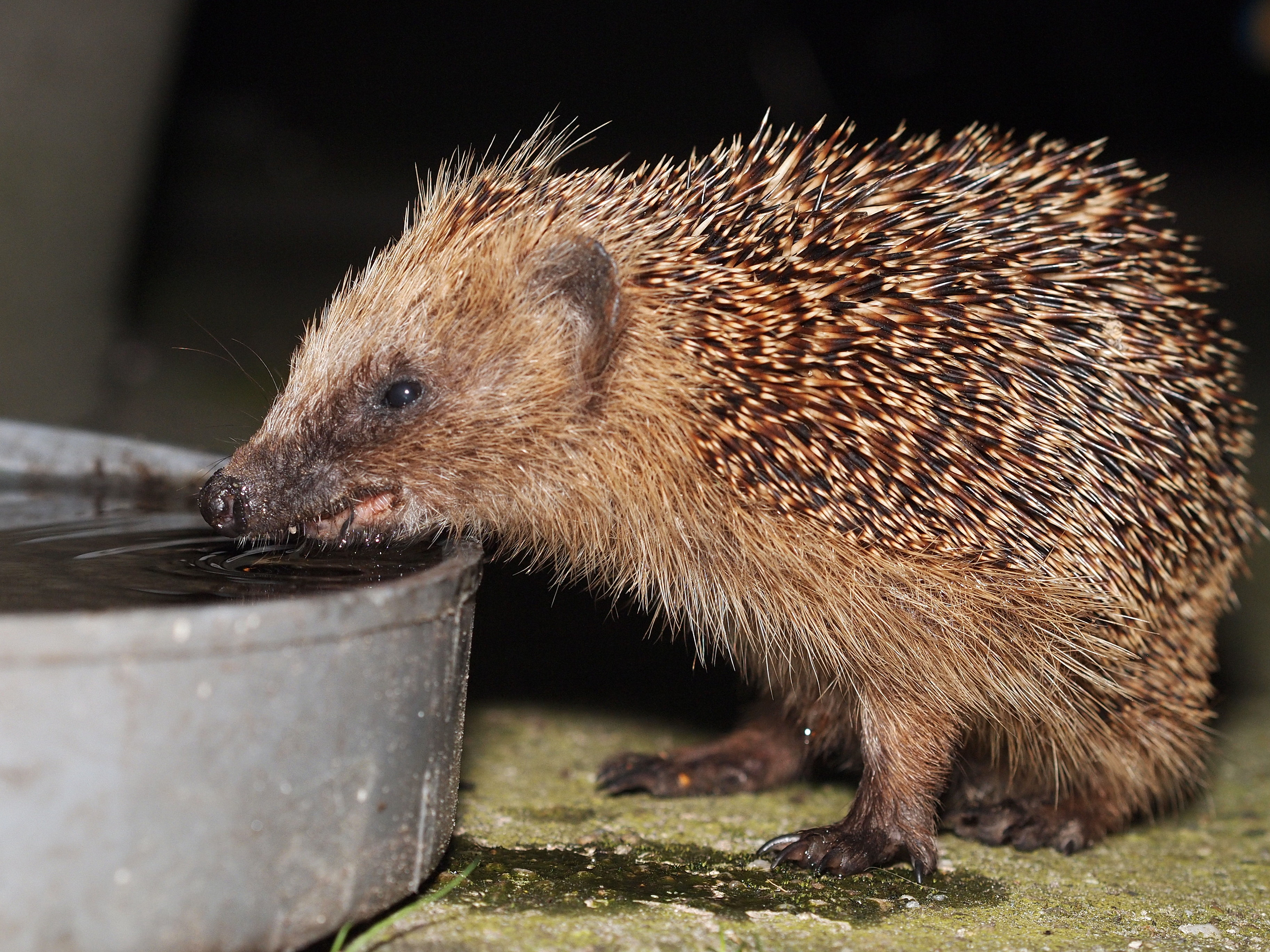 Egel drinkt